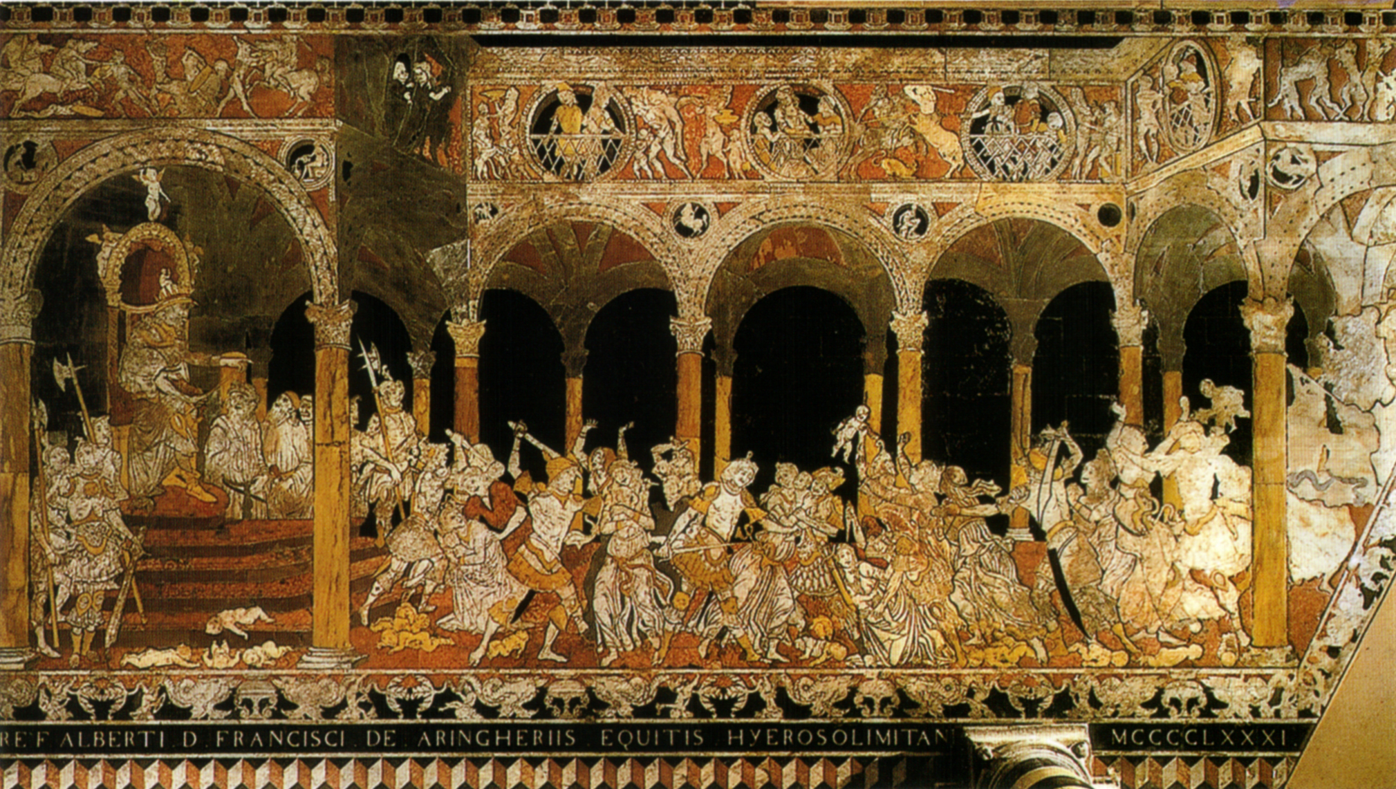 Marble mosaic floor